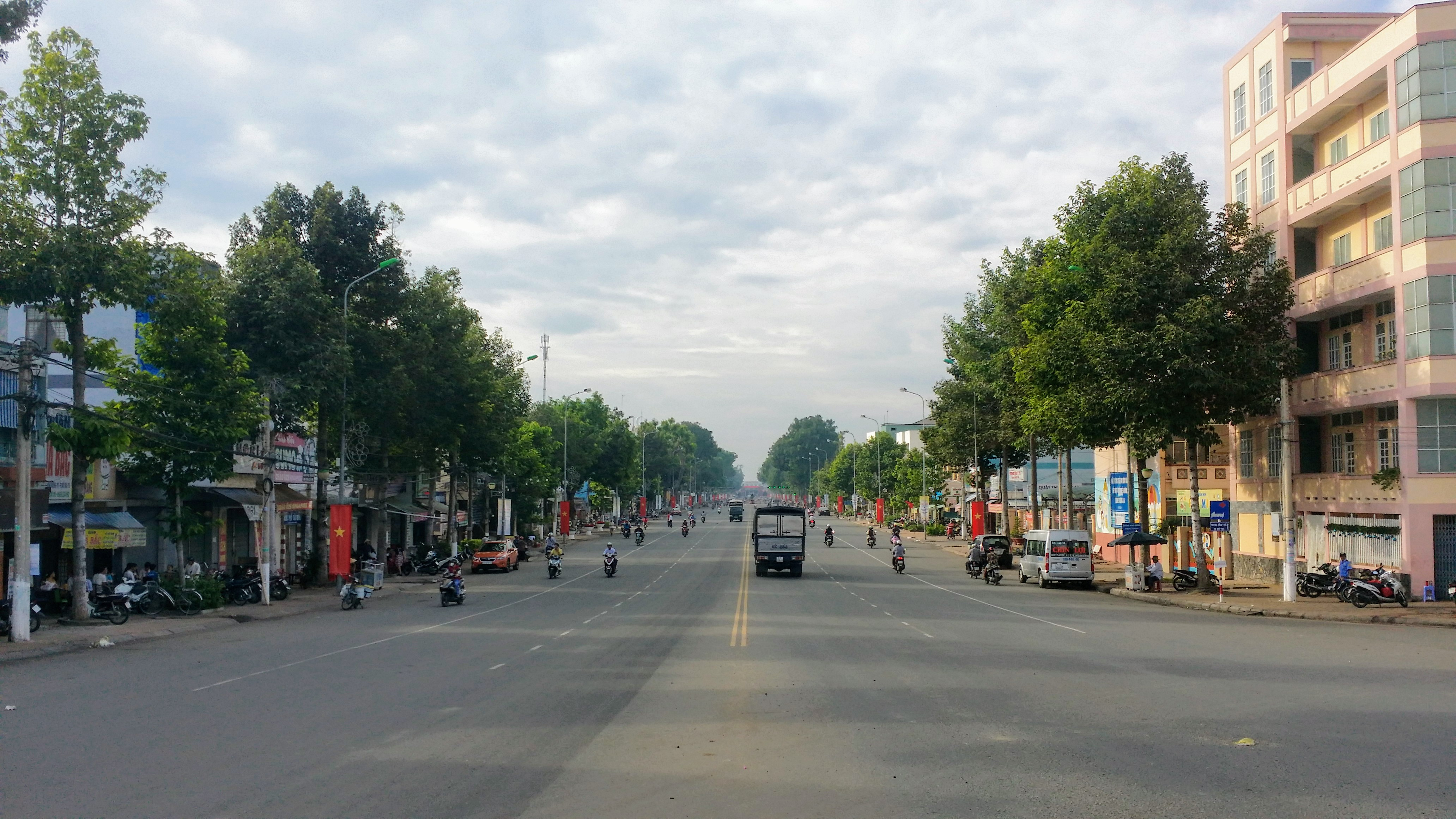 Đại lộ Hùng Vương là con đường rộng nhất nội ô thành phố Mỹ Tho, được phân làn đúng tiêu chuẩn. Con đường này được dùng để tổ chức các lễ hội đường phố, là tuyến đường chính của thành phố.